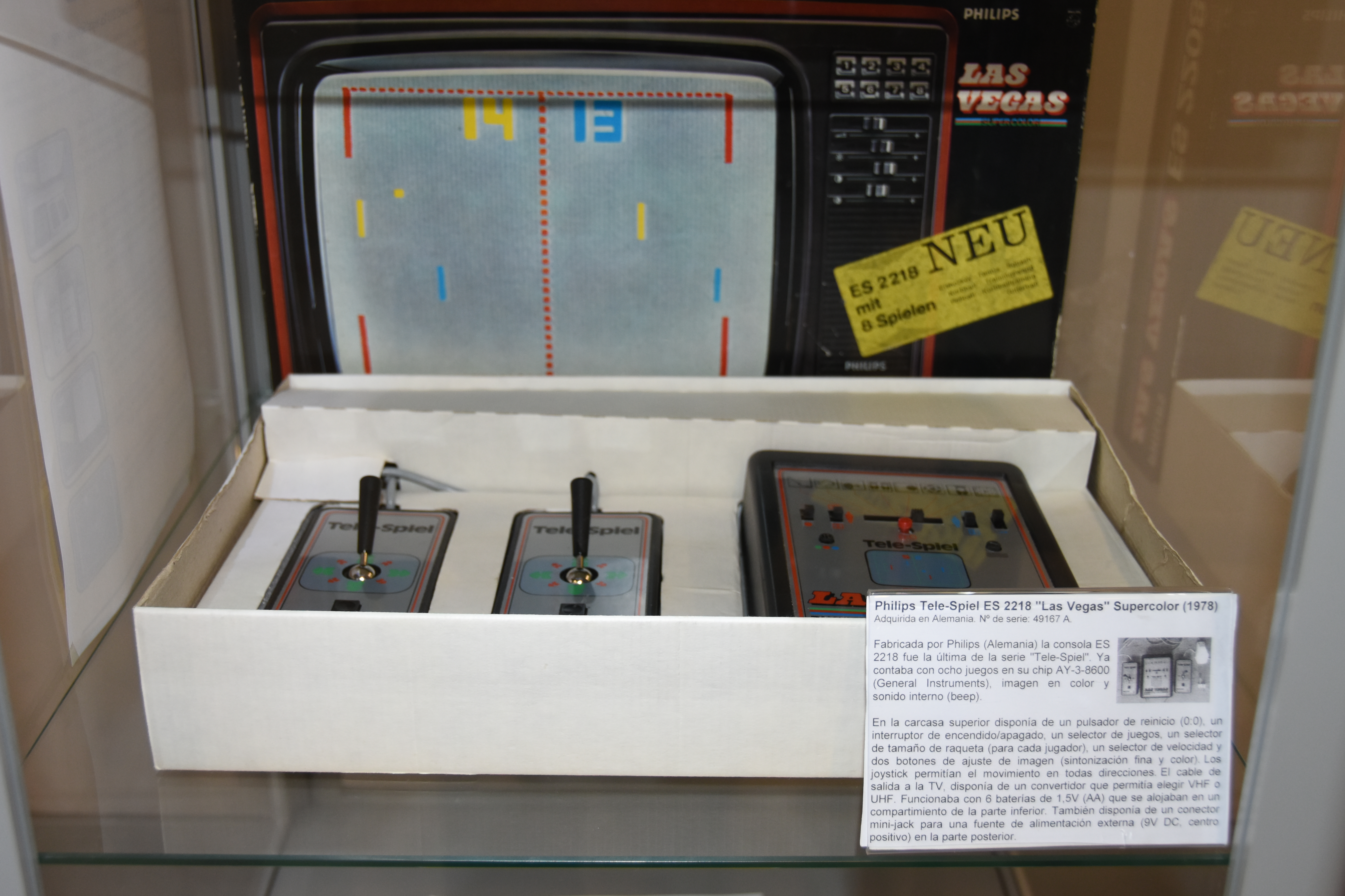 Philips Tele-spiel ES-2218 Las Vegas Supercolor. Pong console [Fotos por cortesía de Fernando Sáenz]